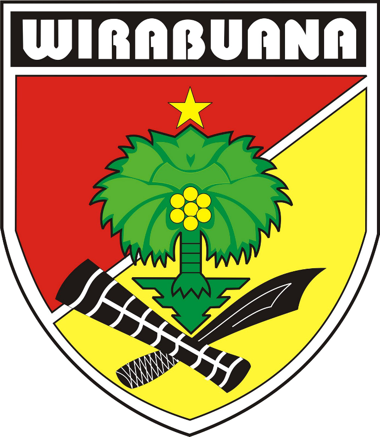 Gambar ini adalah Lambang Kodam VII Wirabuana